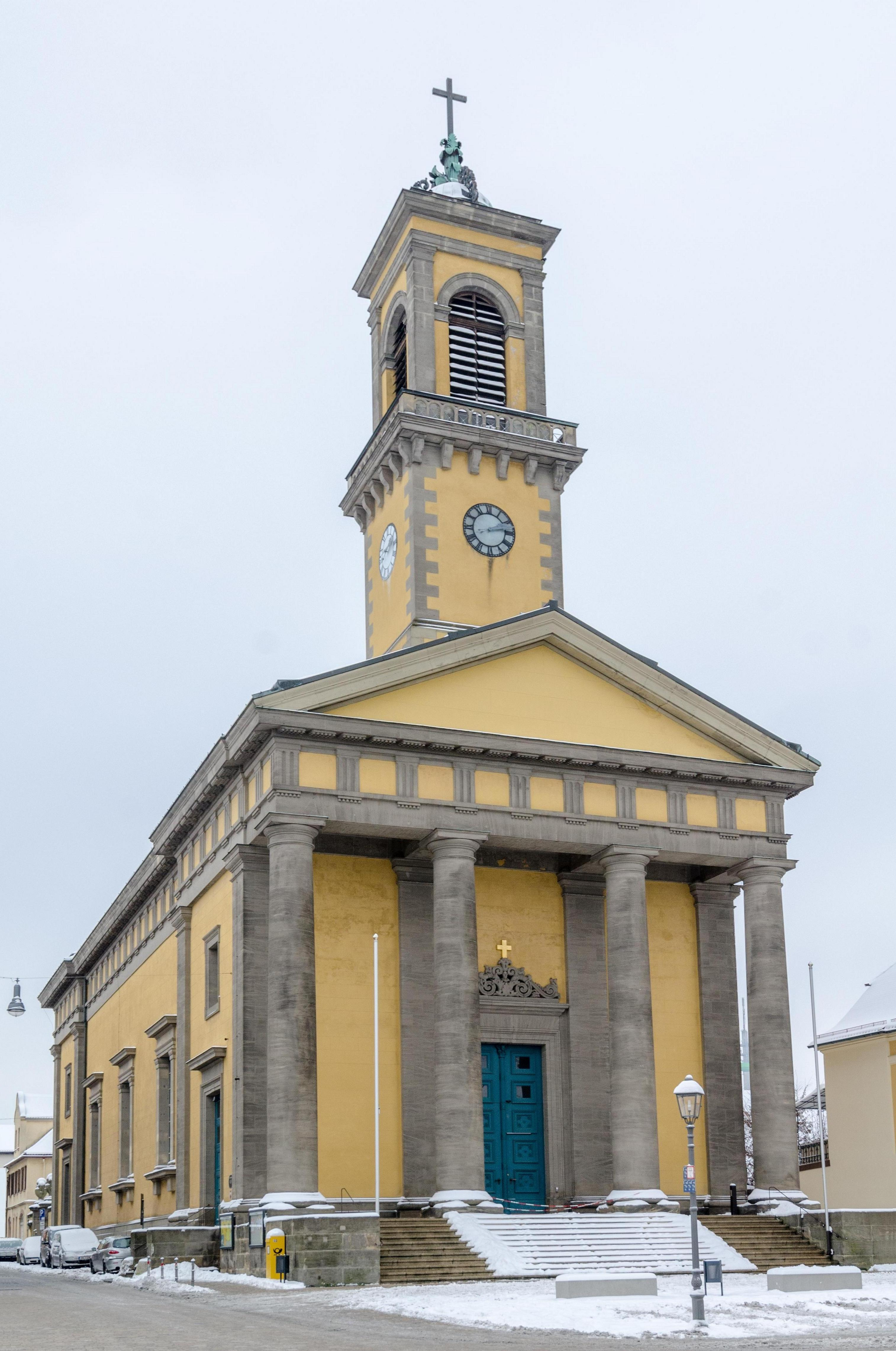 Ansbach, kath. Kirche St. Ludwig am Karlsplatz